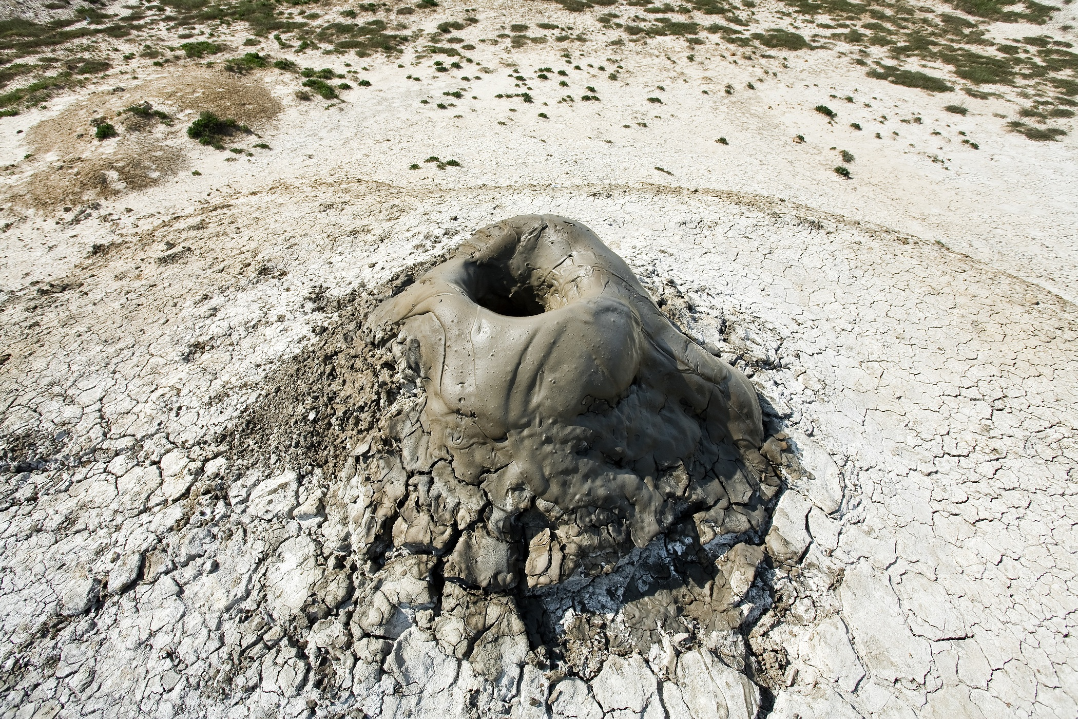 Грязьова сопка Вернадського, Крим, Ленінський р-н, с. Бондаренкове.